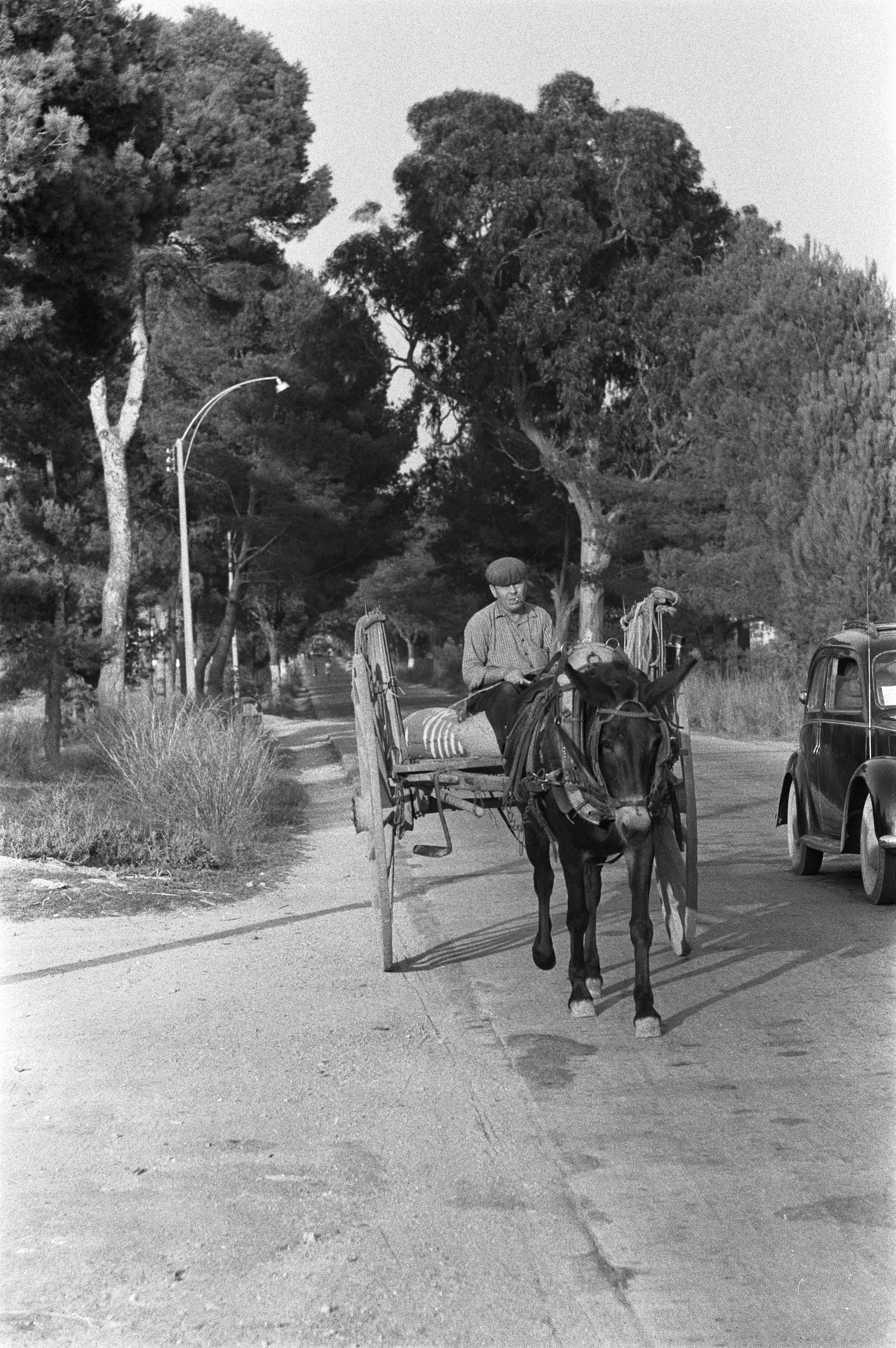 Collectie / Archief : Fotocollectie Anefo Reportage / Serie : [ onbekend ] Beschrijving : Serie over Spanje Datum : 5 oktober 1960 Locatie : Spanje Trefwoorden : bevolking, muildieren Fotograaf : Pot, Harry / Anefo Auteursrechthebbende : Nationaal Archief Materiaalsoort : Negatief (zwart/wit) Nummer archiefinventaris : bekijk toegang 2.24.01.05 Bestanddeelnummer : 911-6491